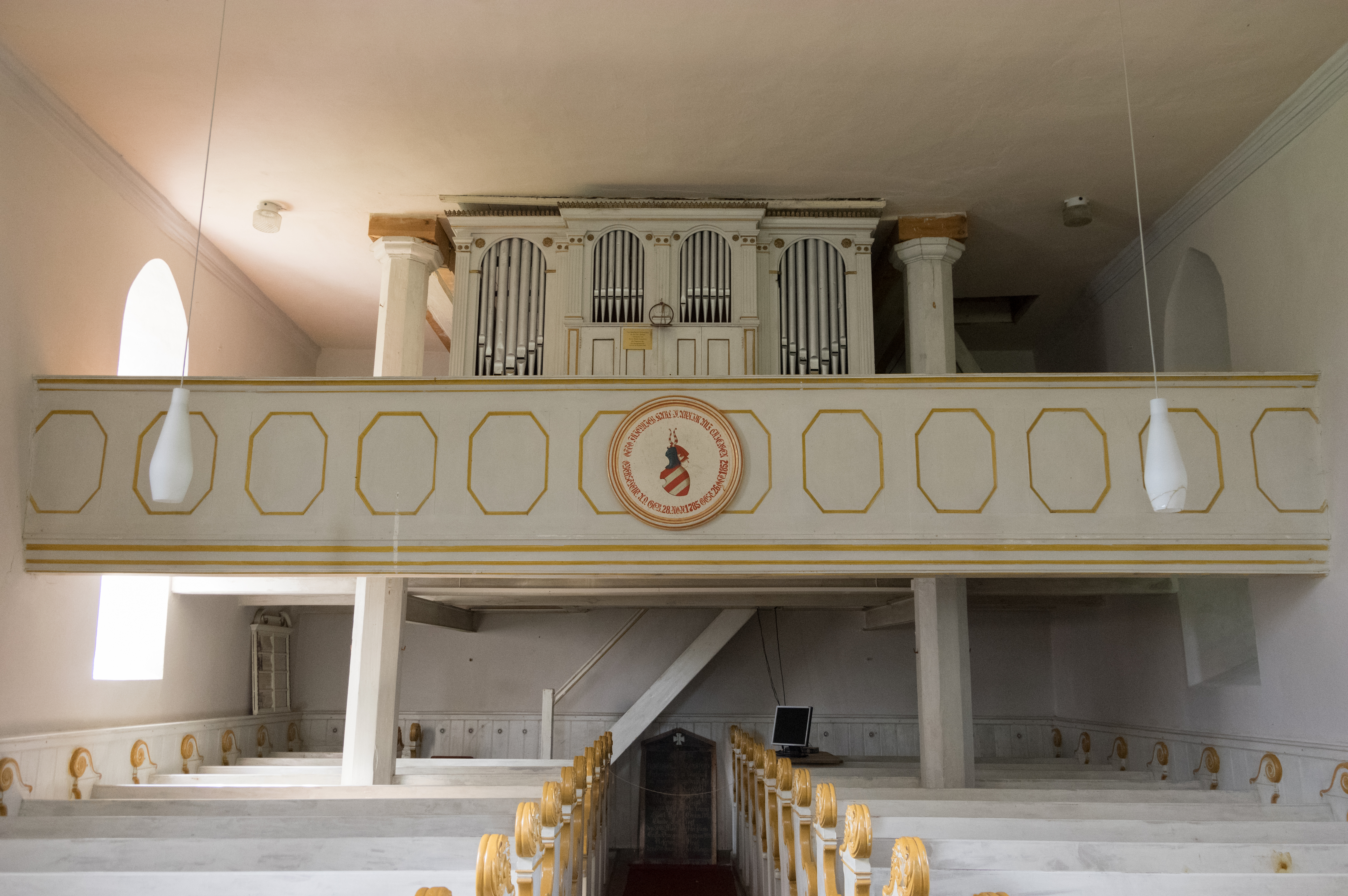 Schwedt/Oder, Ortsteil Criewen in Brandenburg. Die Kirche steht unter Denkmalschutz. Nach dem Dreißigjährigen Krieg wurde die Kirche wieder aufgebaut. Turm und Stufengiebel wurden 1830 hinzugefügt.